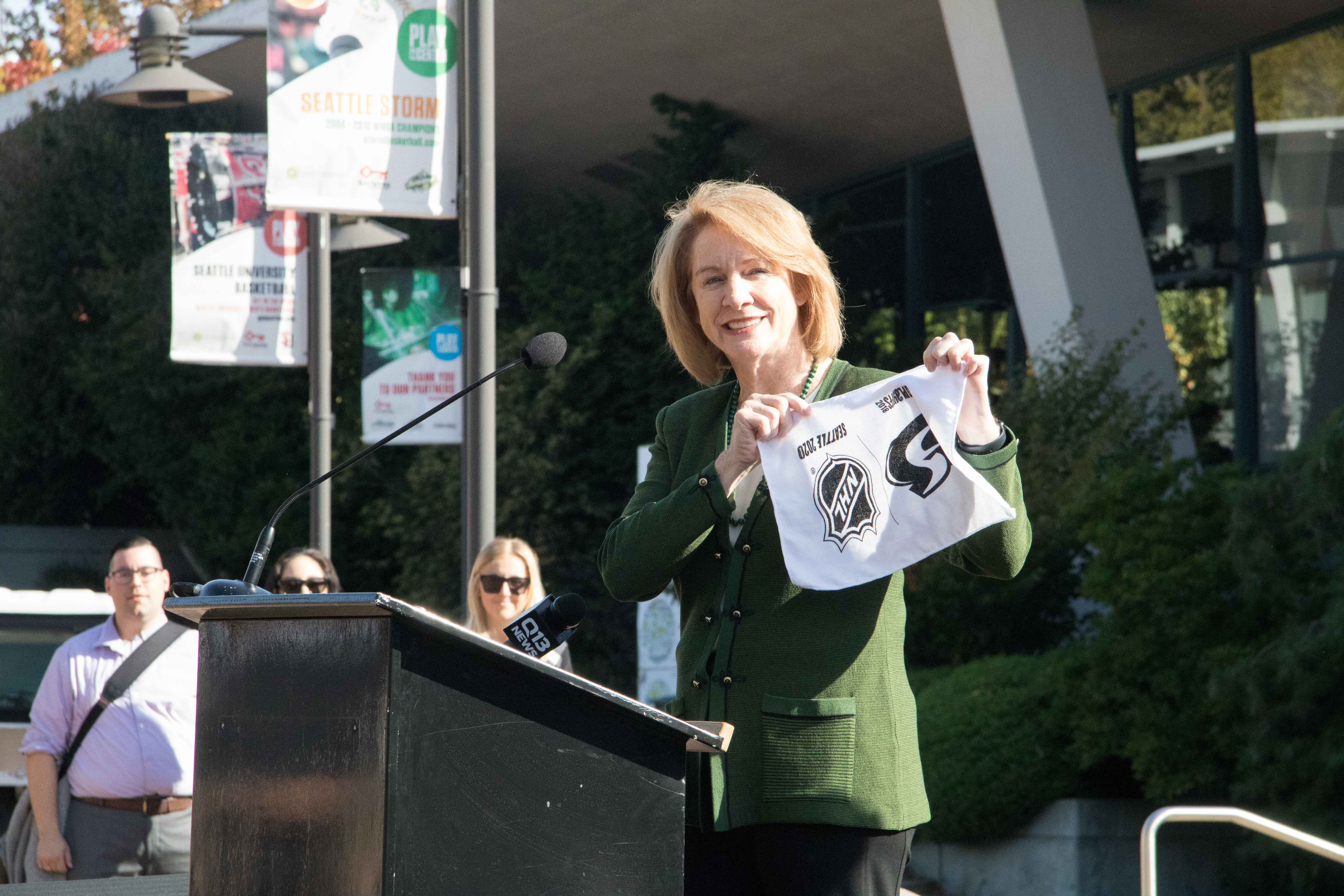 Key-Arena-Bill-Signing-16